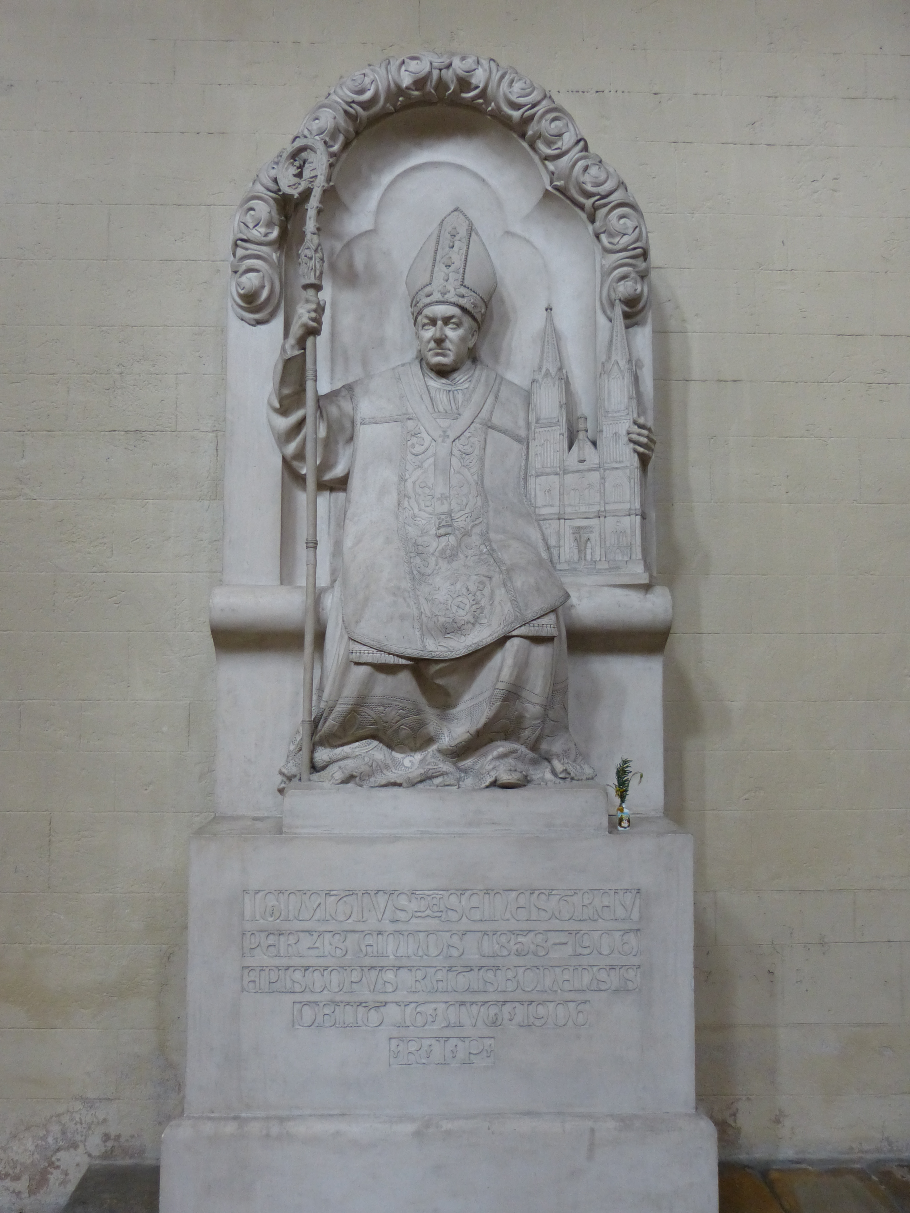 Schottenkirche St. Jakob, Regensburg, Bayern